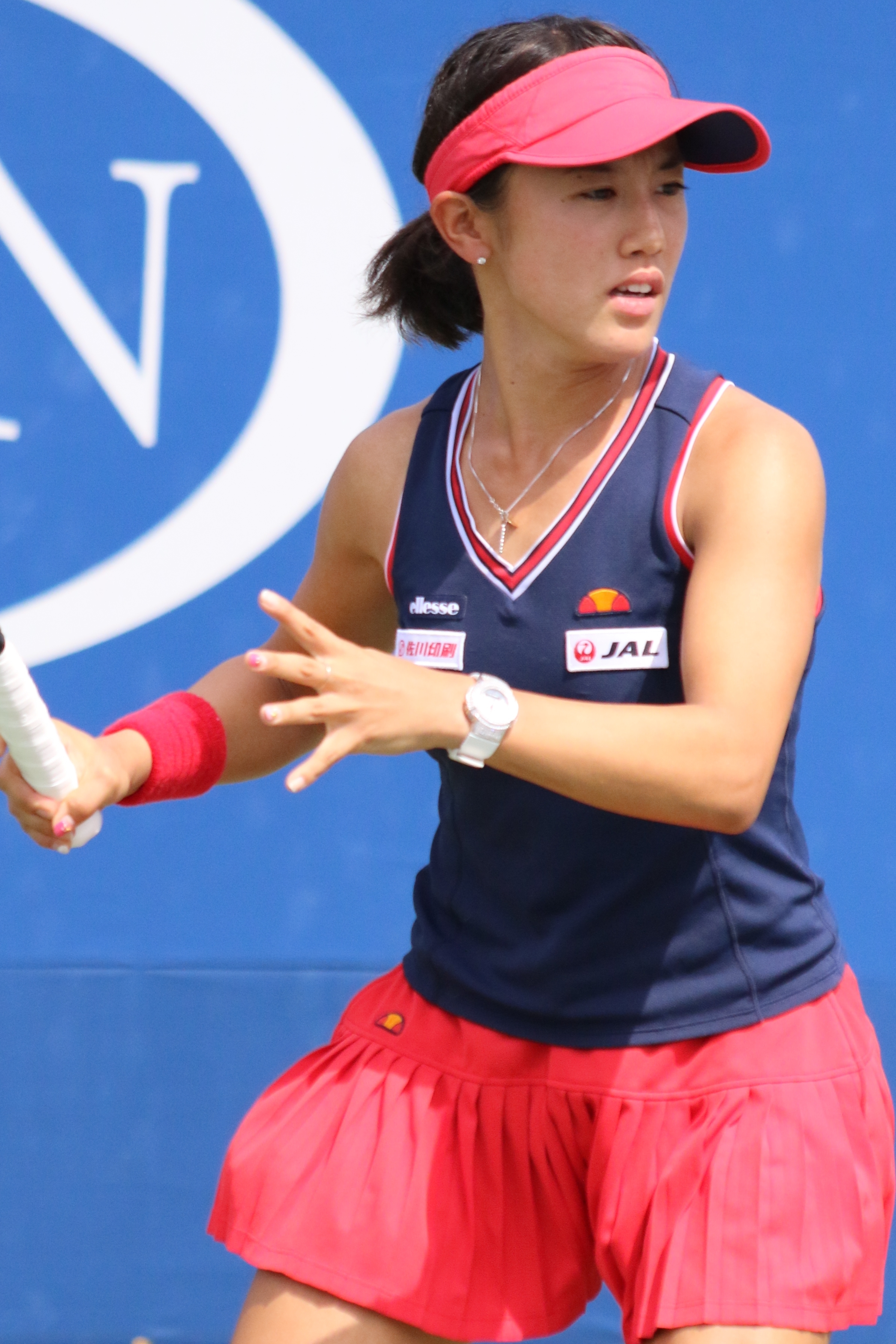 Kato US16 (12)